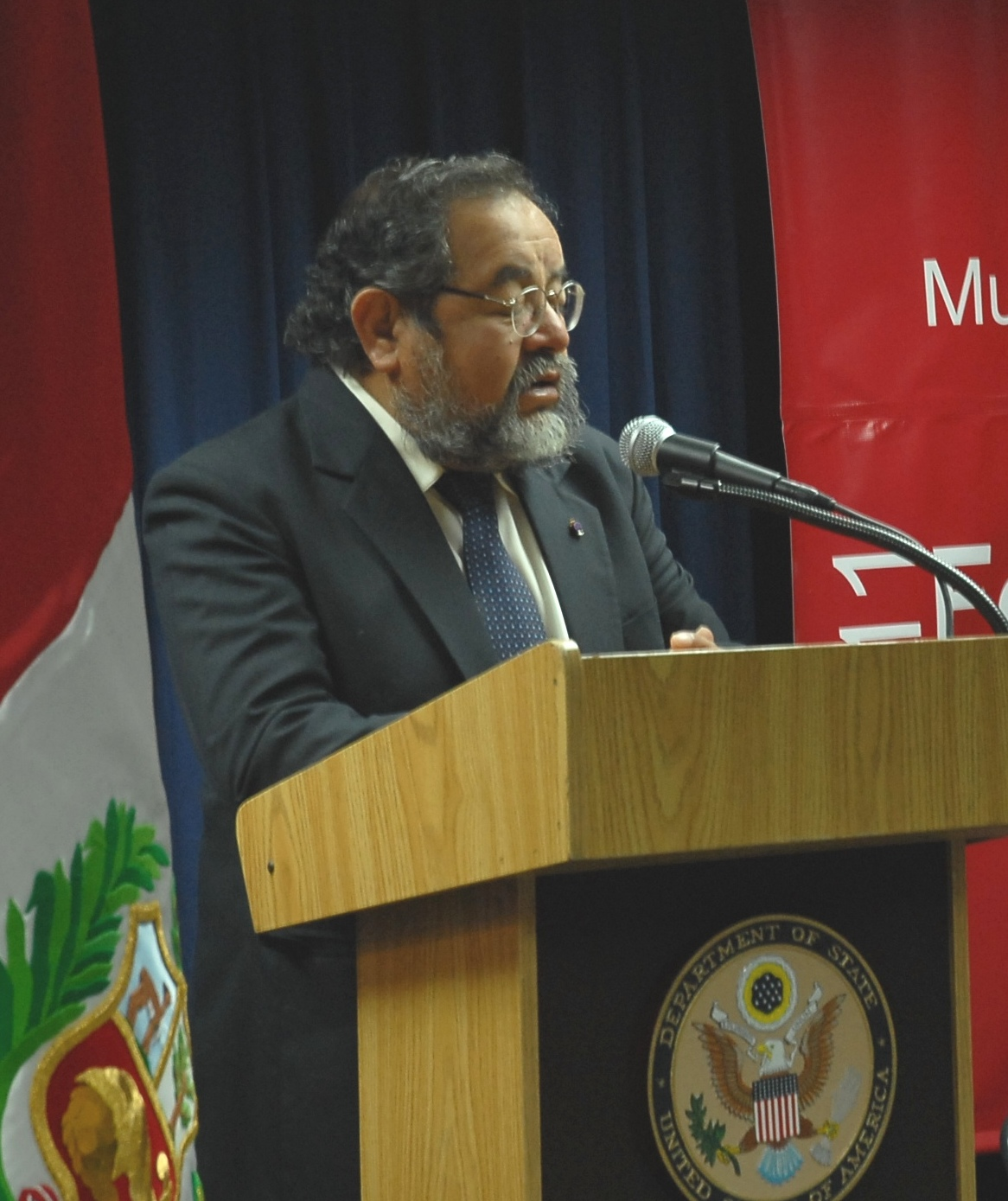 Doctor Walter Alva, Director del Museo Tumbas Reales de Sipán y Embajadora Rose M. Likins